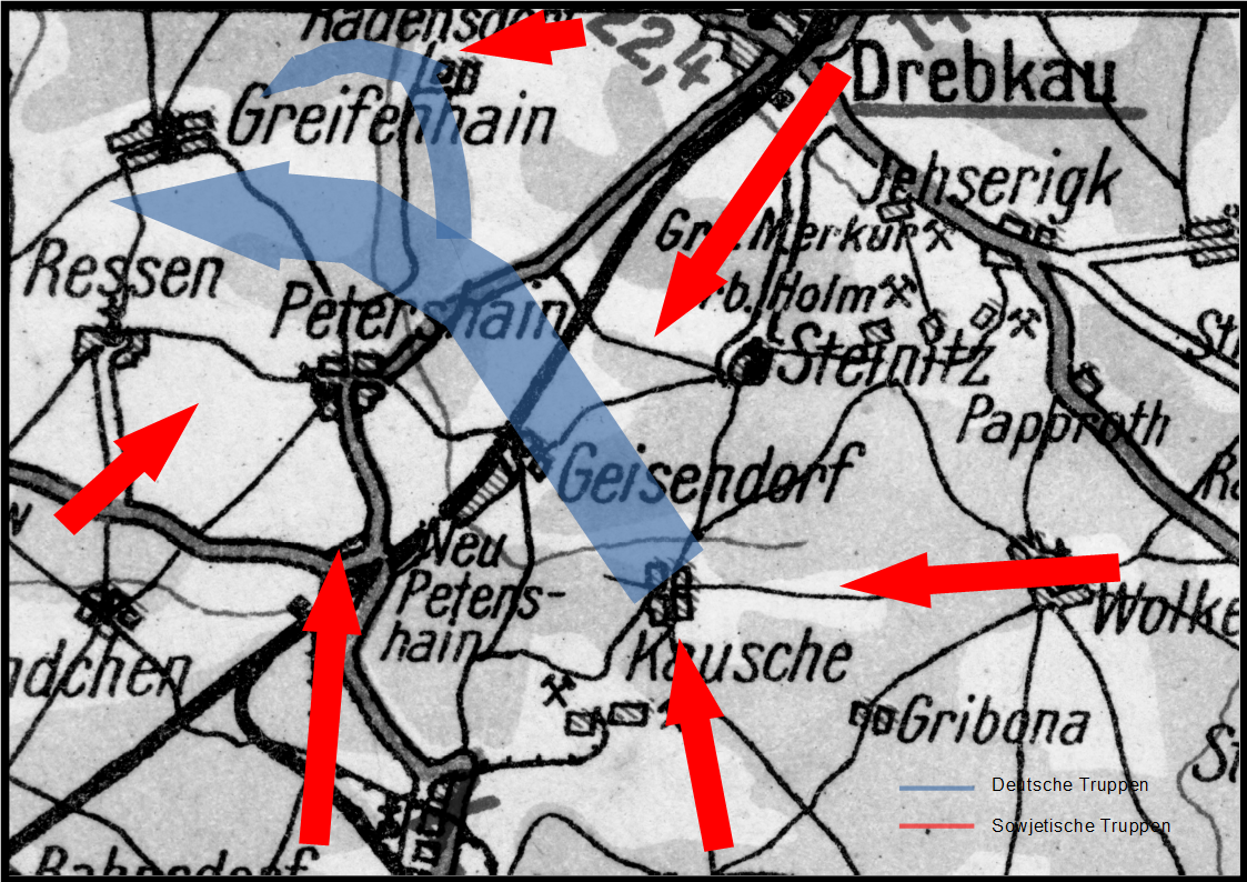 Darstellung der Ausbruchsrichtung der eingeschlossenen deutschen Verbände der 10. SS PD Div. “Frundsberg”, der 344. Inf.Div und der FBD.